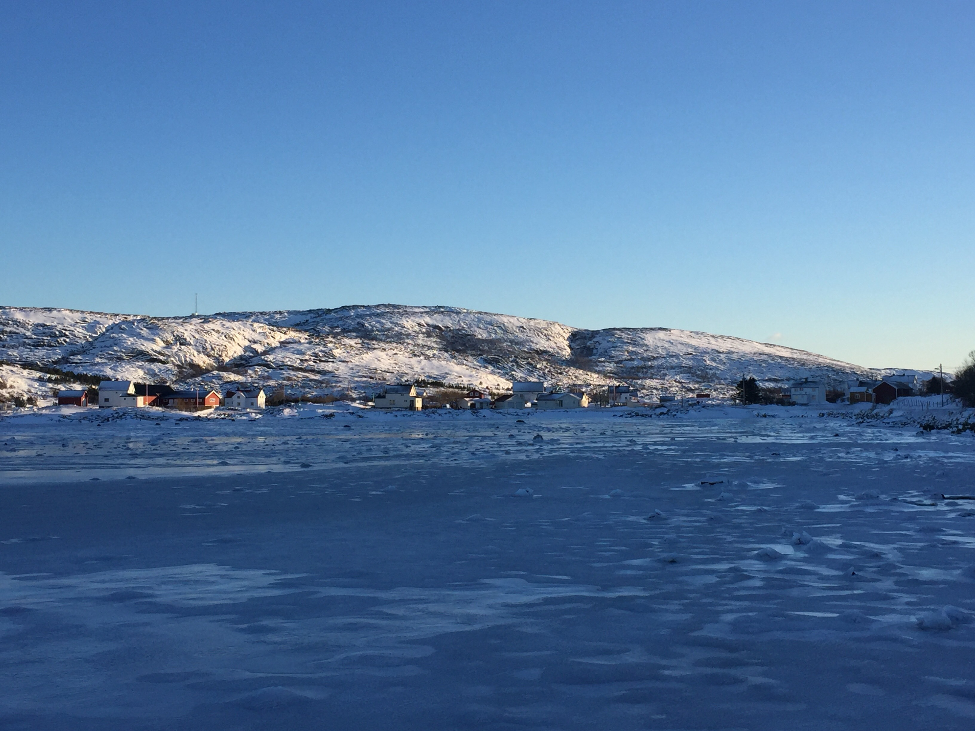 Valøya på Ytre Vikna i Vikna kommune i Trøndelag, sett fra den grunne og frosne Nordvågen.